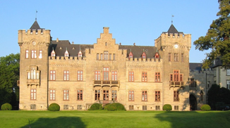 Schloss Herdringen von der östlichen Seite